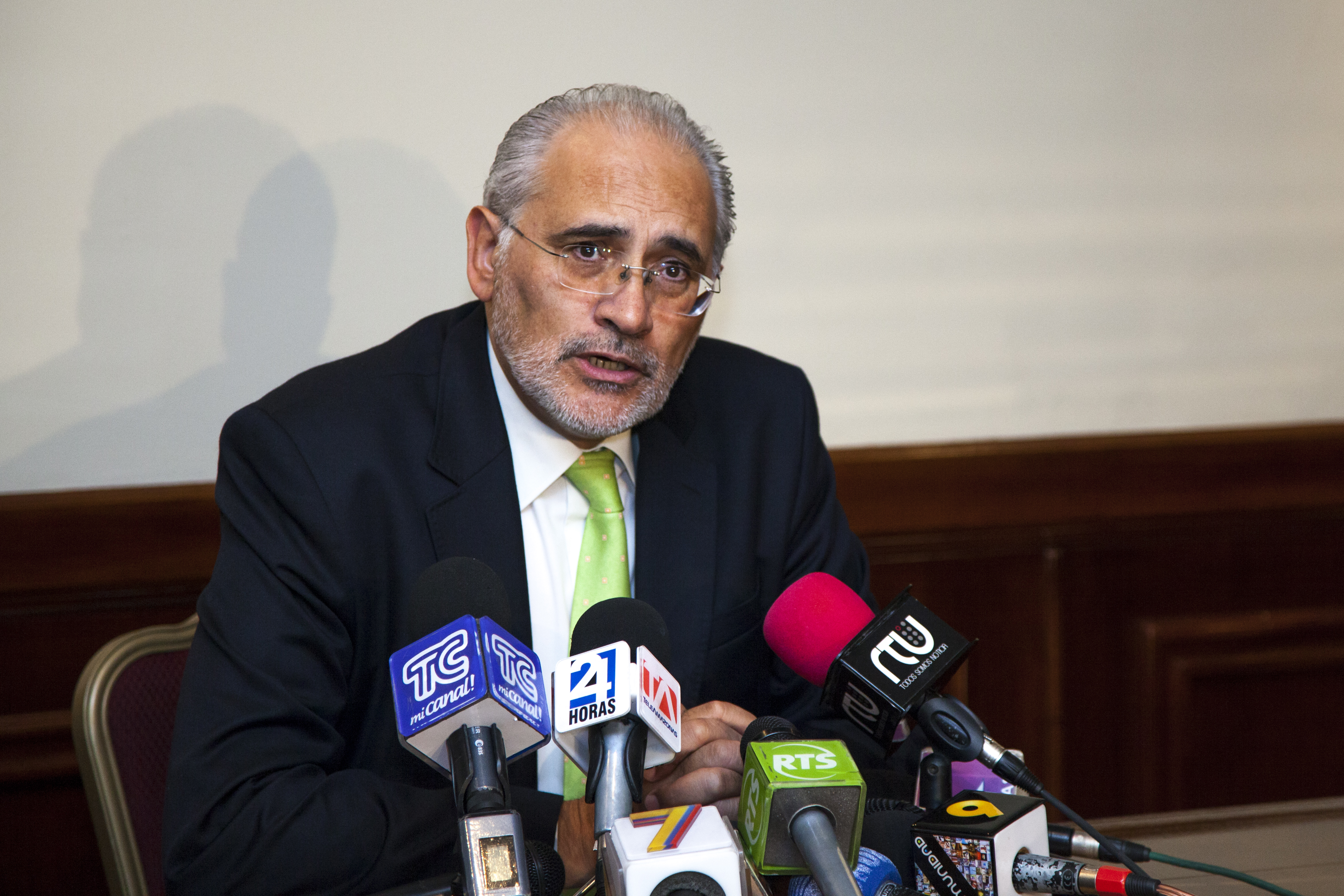 Ciudad de Guatemala, 18 ago 2014.- En la gráfica, Carlos Meza, ex presidente de Bolivia en diálogo con la prensa . Foto: Nina Zambrano Díaz. Cancillería del Ecuador.